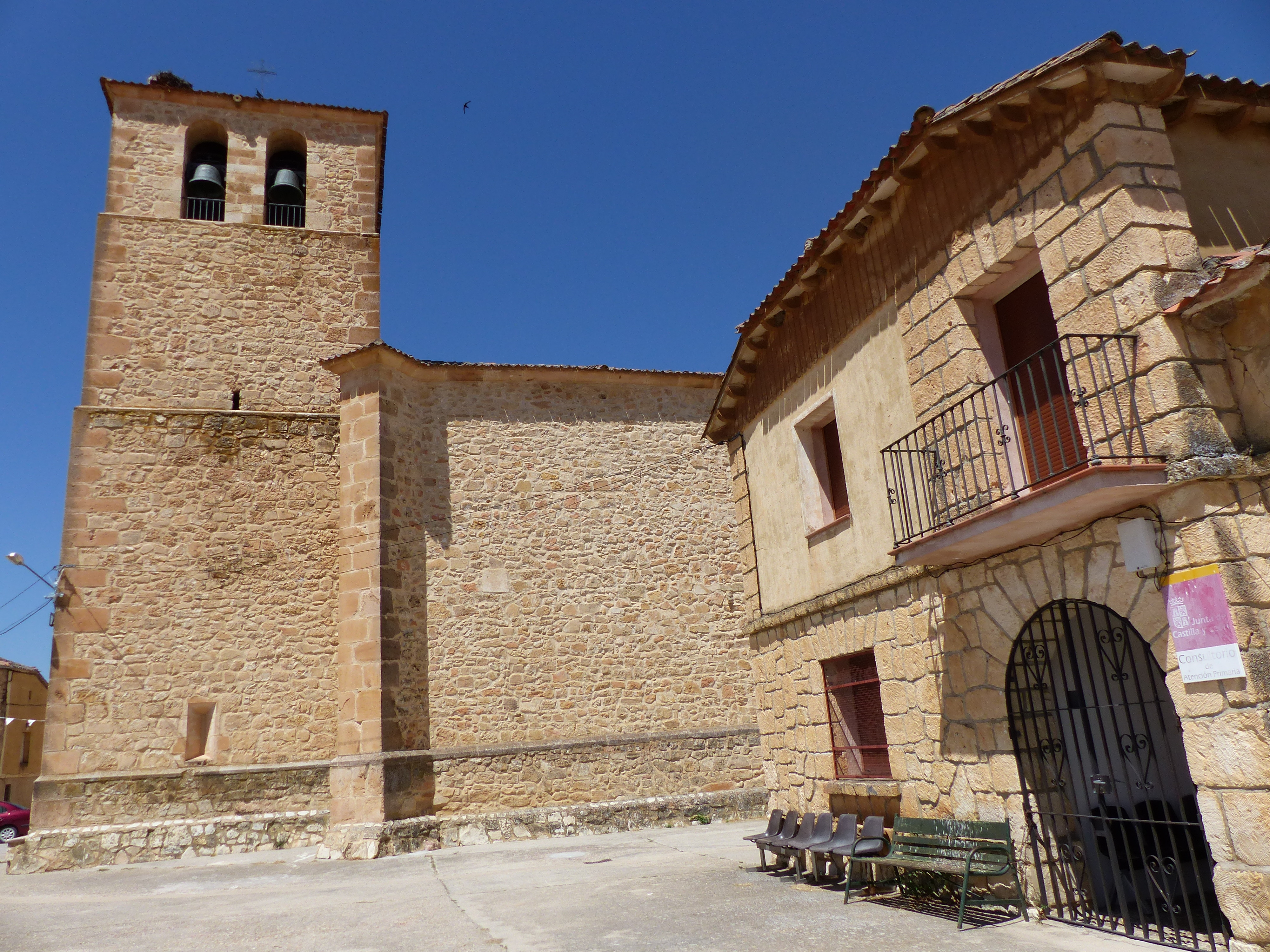 Valleruela de Sepúlveda